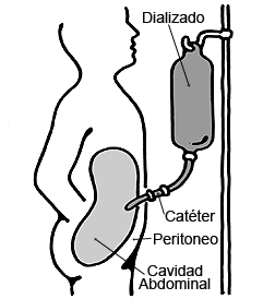 diálisis peritoneal